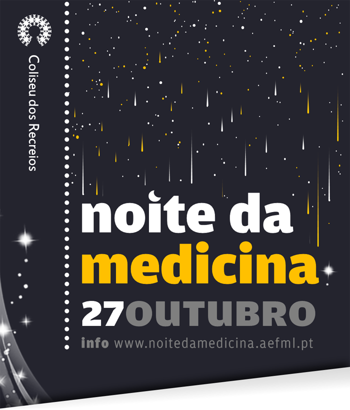 XXXVII Noite da Medicina (2010) AEFML